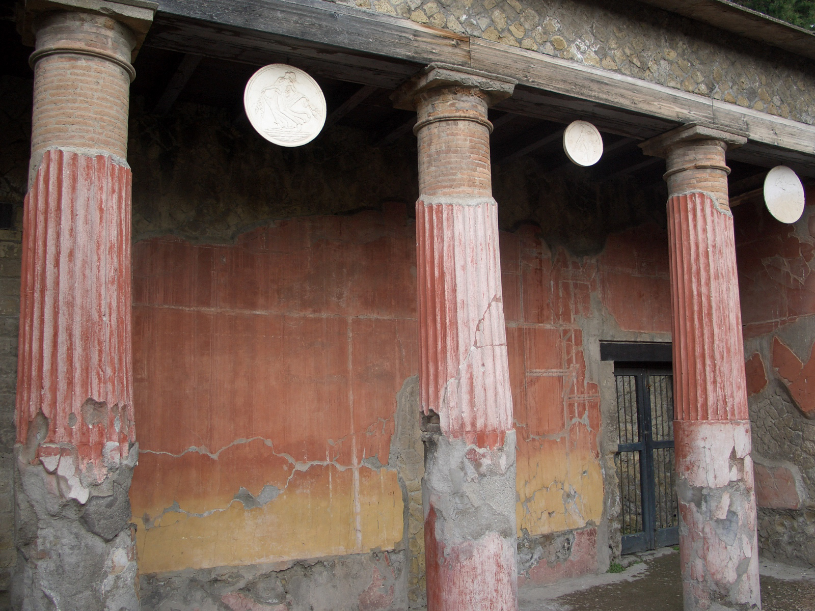 Ruins of Herculaneum, Italy - Casa del Rilievo di Telefo.